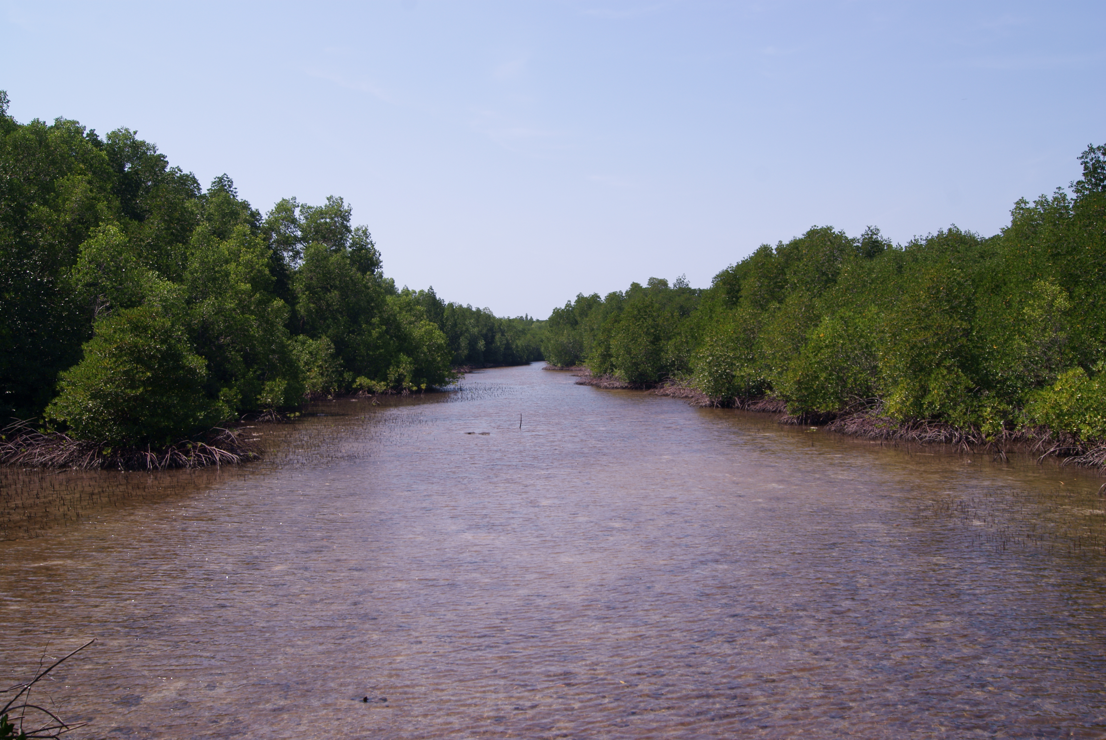 Hutan bakau di Pulau Karimun Jawa